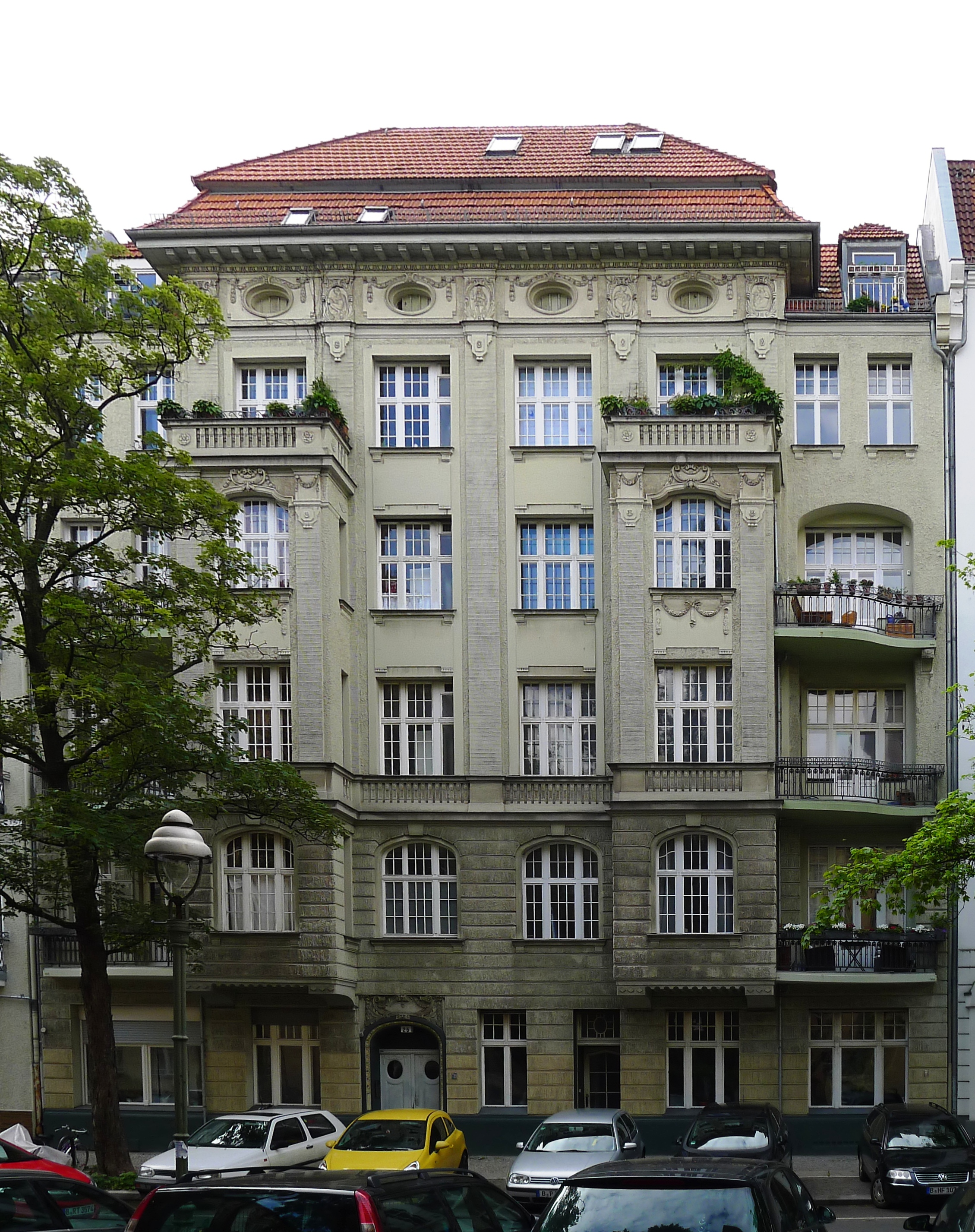 Mietshaus